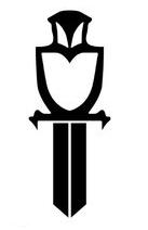 Lunds akademiska officersällskaps symbol